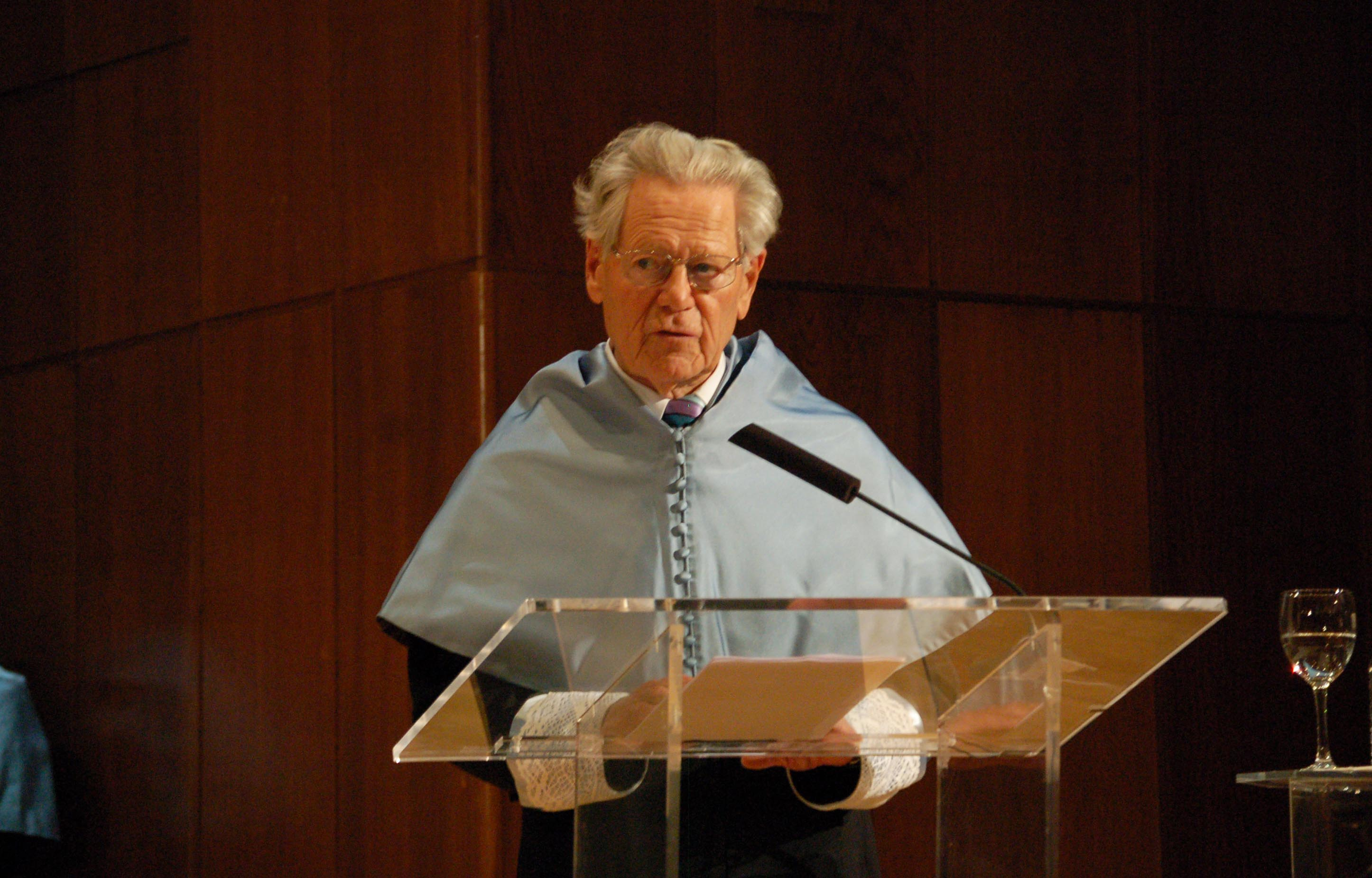 Hans Küng investido Doctor Honoris Causa en la Universidad Nacional de Educación a Distancia (UNED).